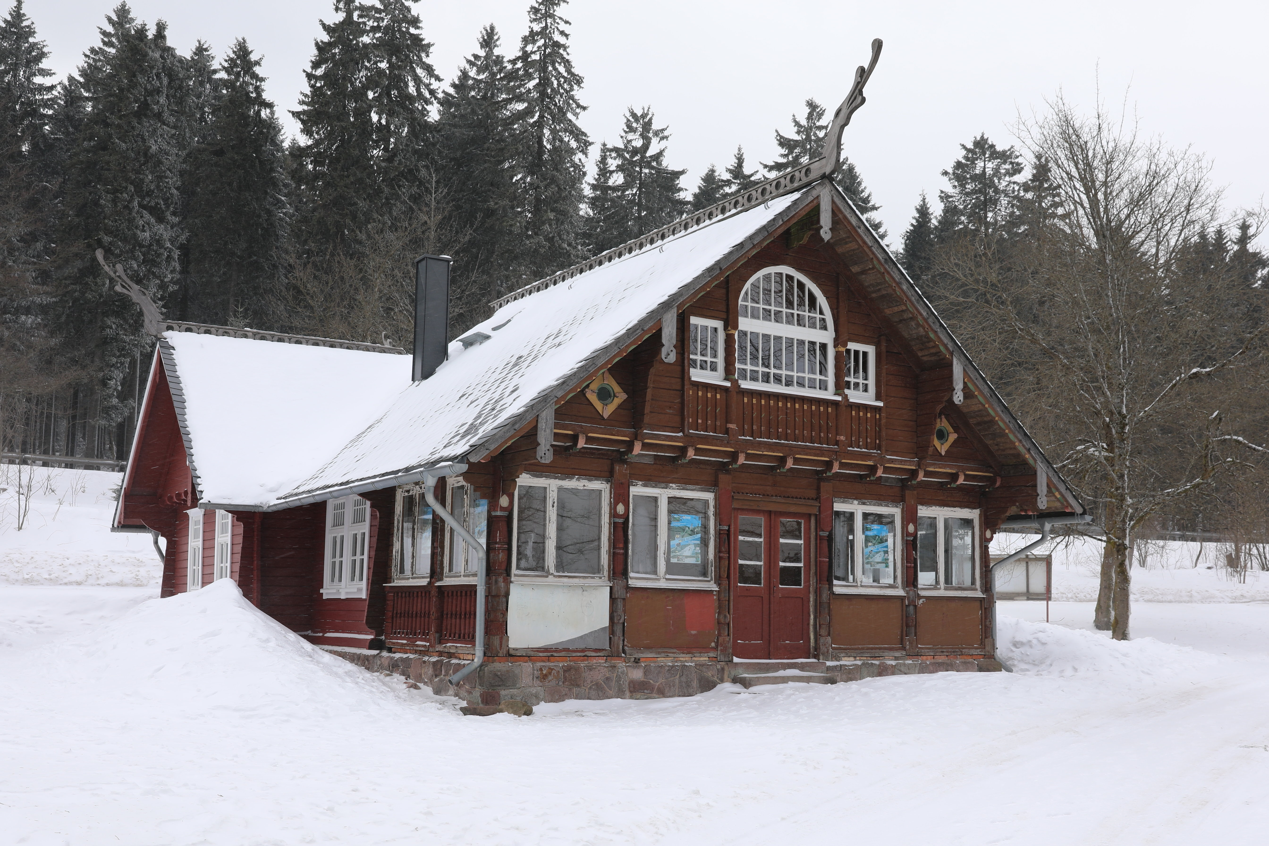 Ehemaliges Golfclubhaus von 1908 in Oberhof